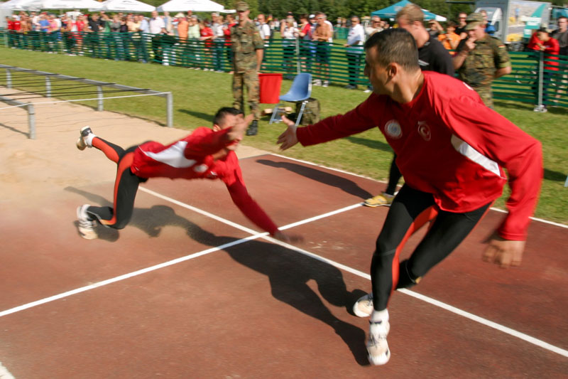 Militärischer Fünfkampf Hindernisbahn-Staffellauf Team Türkei Sport